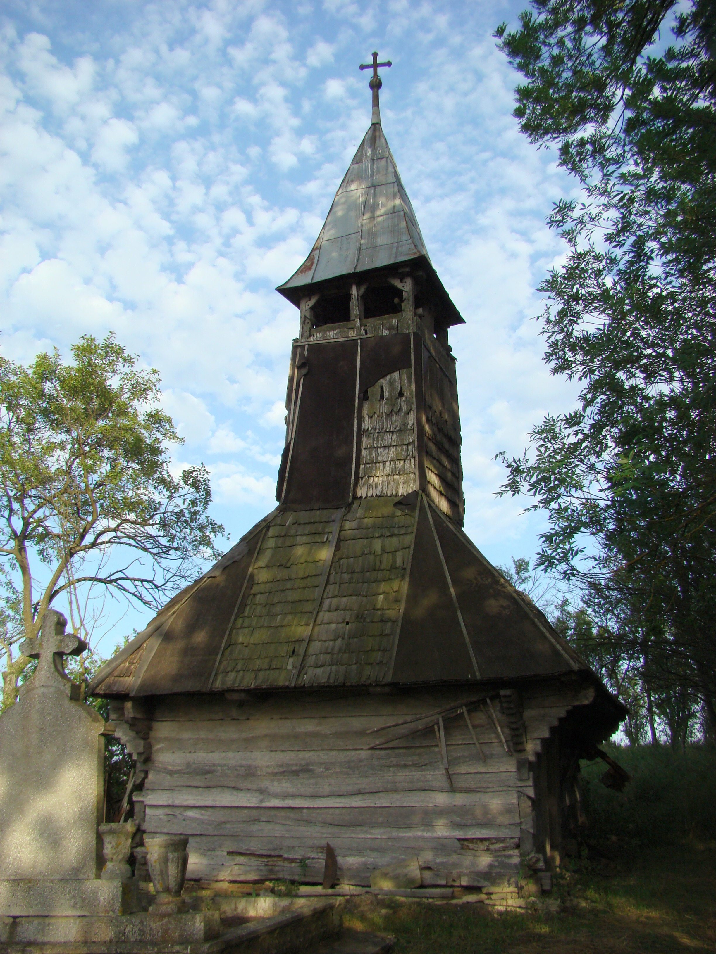 Biserica de lemn din Săliștea Veche, comuna Chinteni, județul Cluj